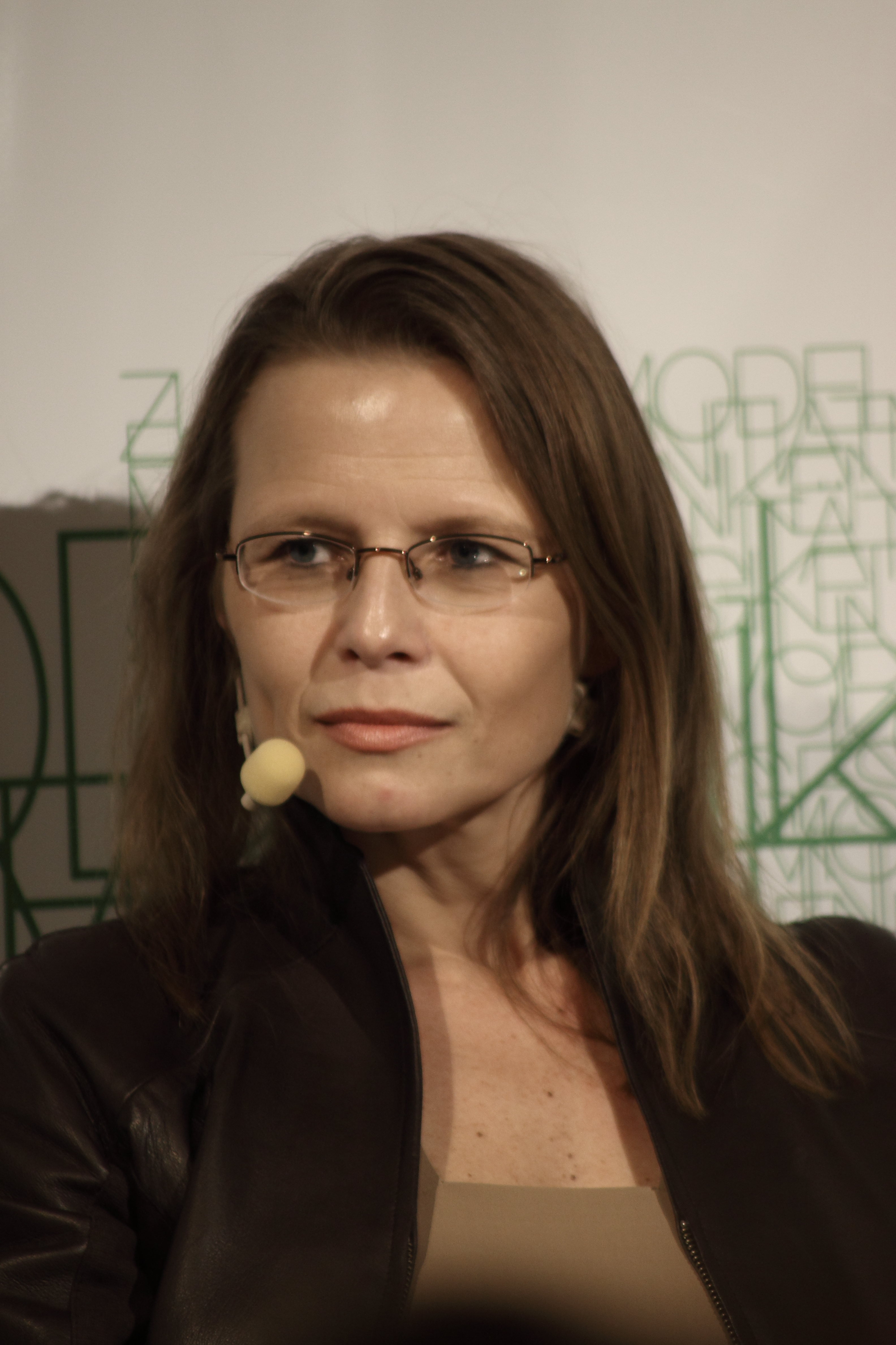 Beatrix Karl, Ministerin für Wissenschaft und Forschung